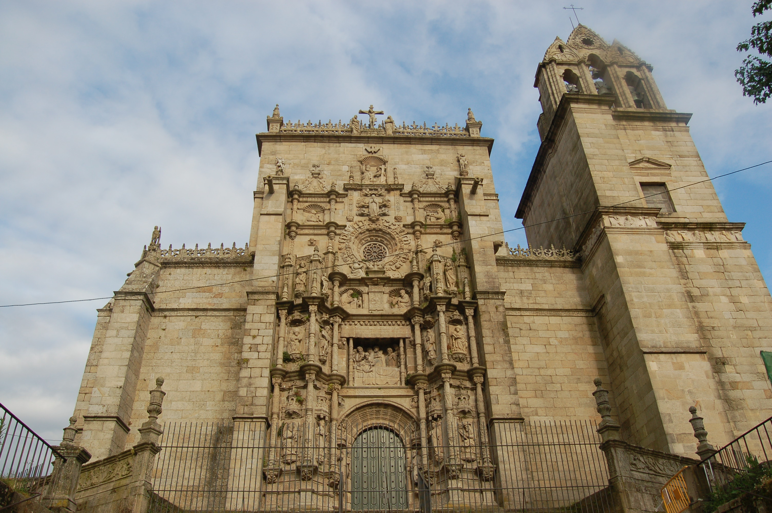 Basílica de Santa María a Maior de Pontevedra